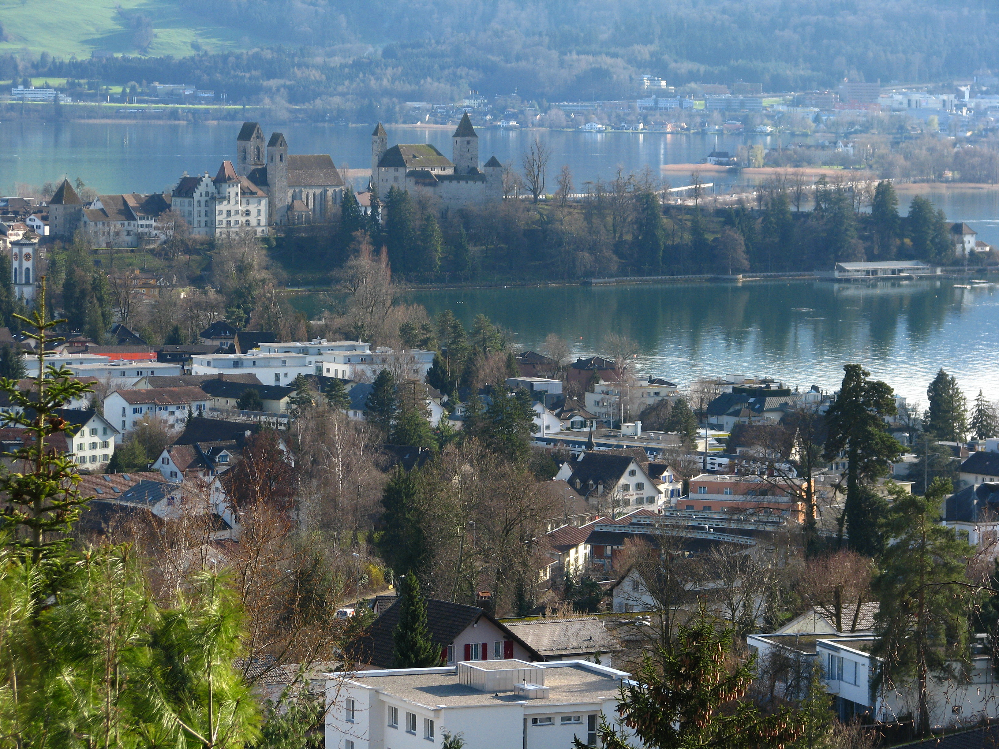 Kempratner Bucht (Bay of Kempraten) and Herrenberg in Rapperswil (SG), i.e. Stadtmuseum, Stadtpfarrkirche St. Johann (St. John's Church), Liebfrauenkapelle and Schloss Rapperswil, as seen from Frohberg in Kempraten-Lenggis (Switzerland); Kapuzinerkloster to the right, Seedamm, Pfäffikon (SZ) and Obersee (upper Lake Zürich) in the background.